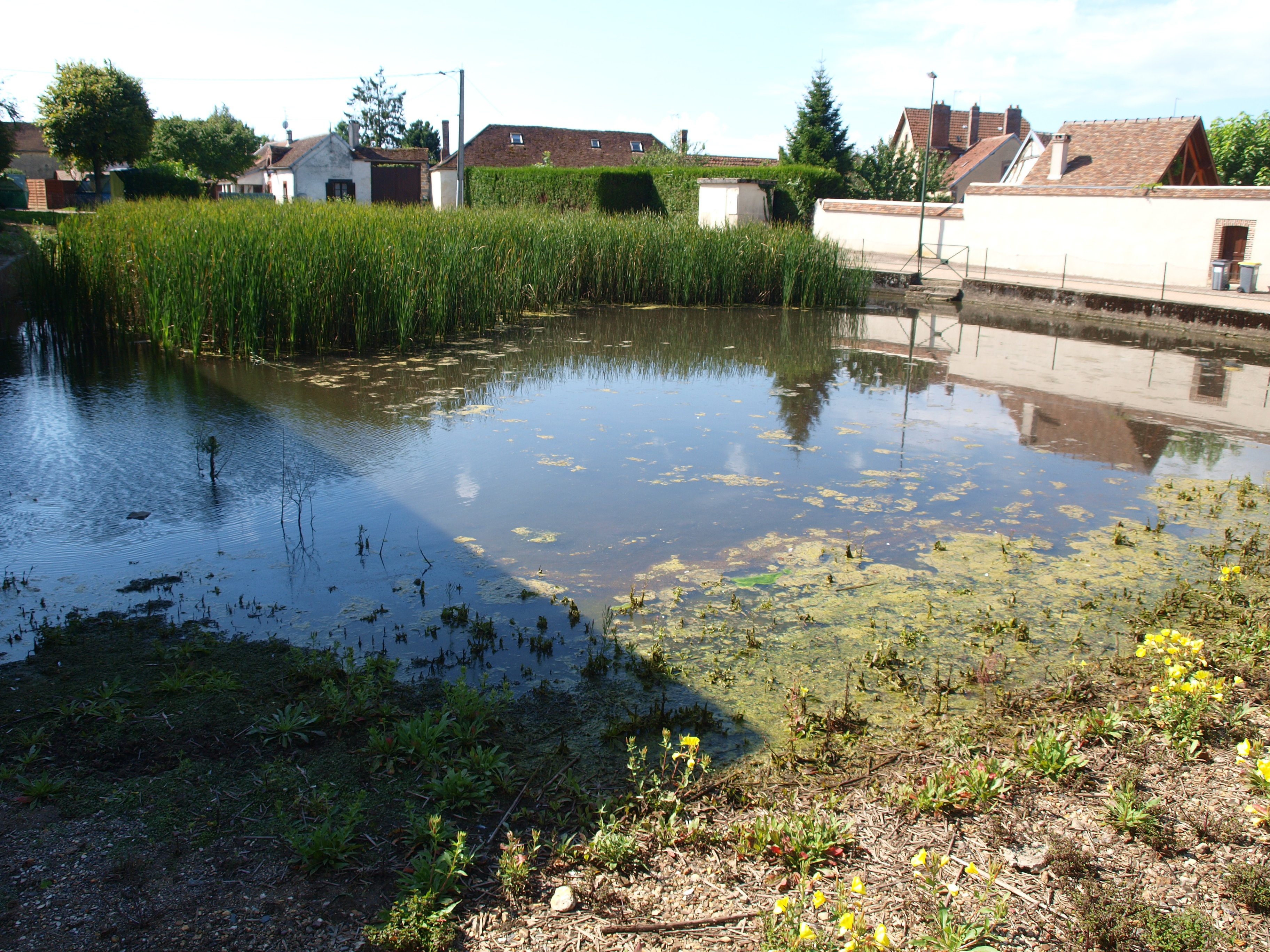 Perceneige (Yonne, France) ; village de Grange-le-Bocage : mare communale (ce que les champenois & ardennais nomment une gloye)